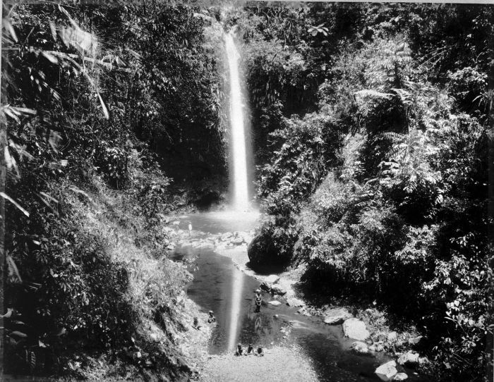 Foto. De waterval bij Rempoewah in de buurt van Poerwokerto.